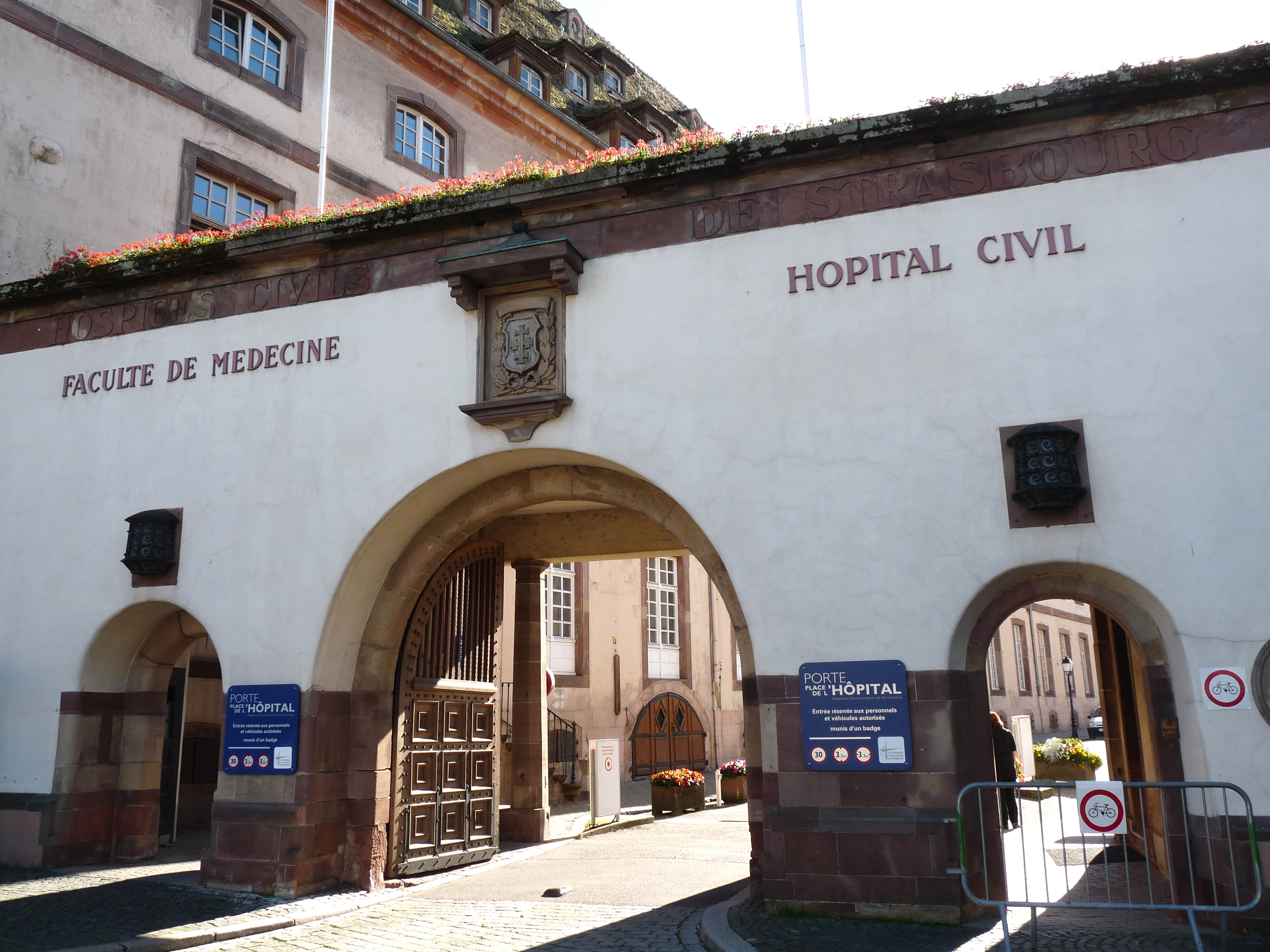 Entrée de l'Hôpital Civil de Strasbourg et de l'ancienne Faculté de Médecine, côté place de l'Hôpital.